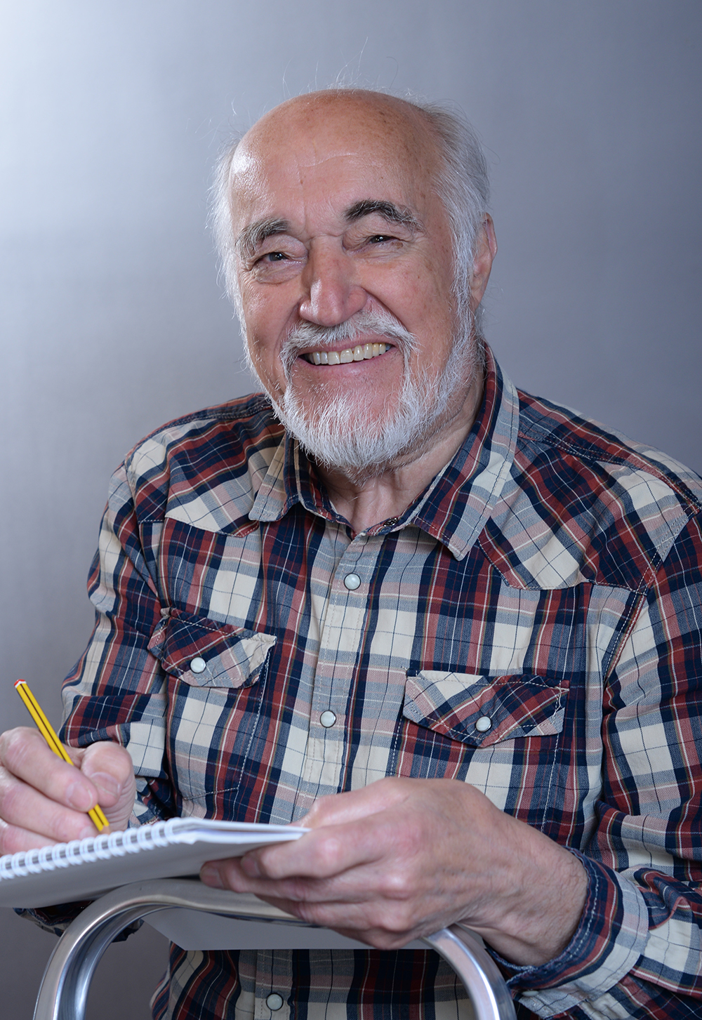 Manel Ferrer Estany, il·lustrador